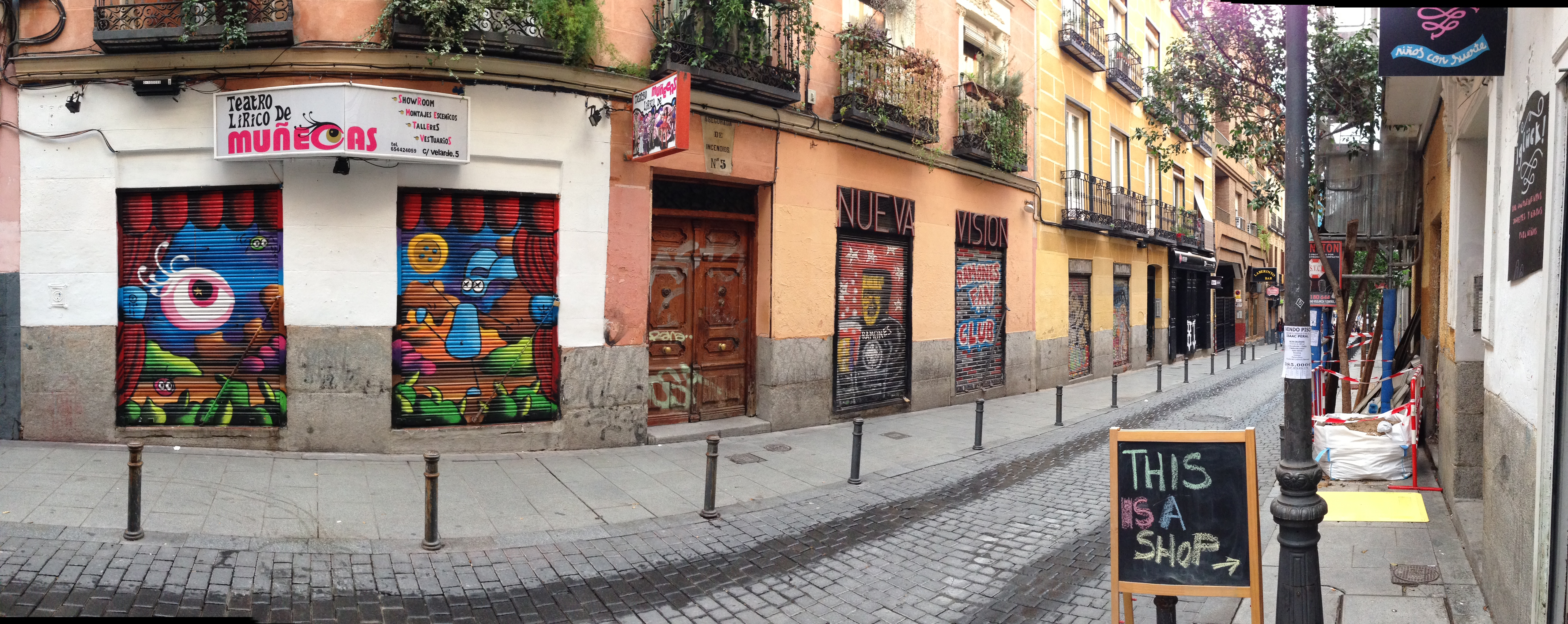 Calle de Velarde 5, Madrid, España.